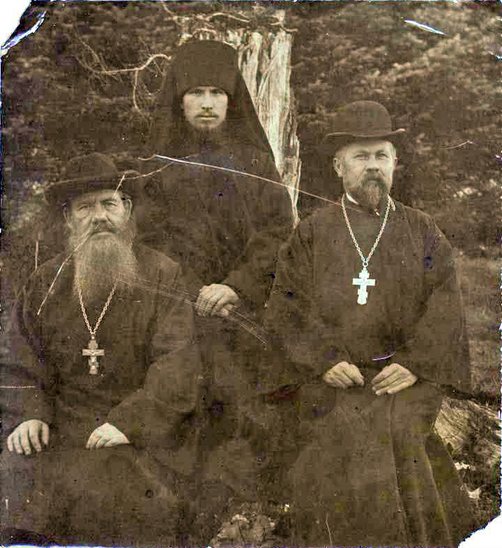 Русское духовенство на Аляске: Иоанн Соболев, иеромонах Серафим (Самойлович), Андрей Кашеваров.